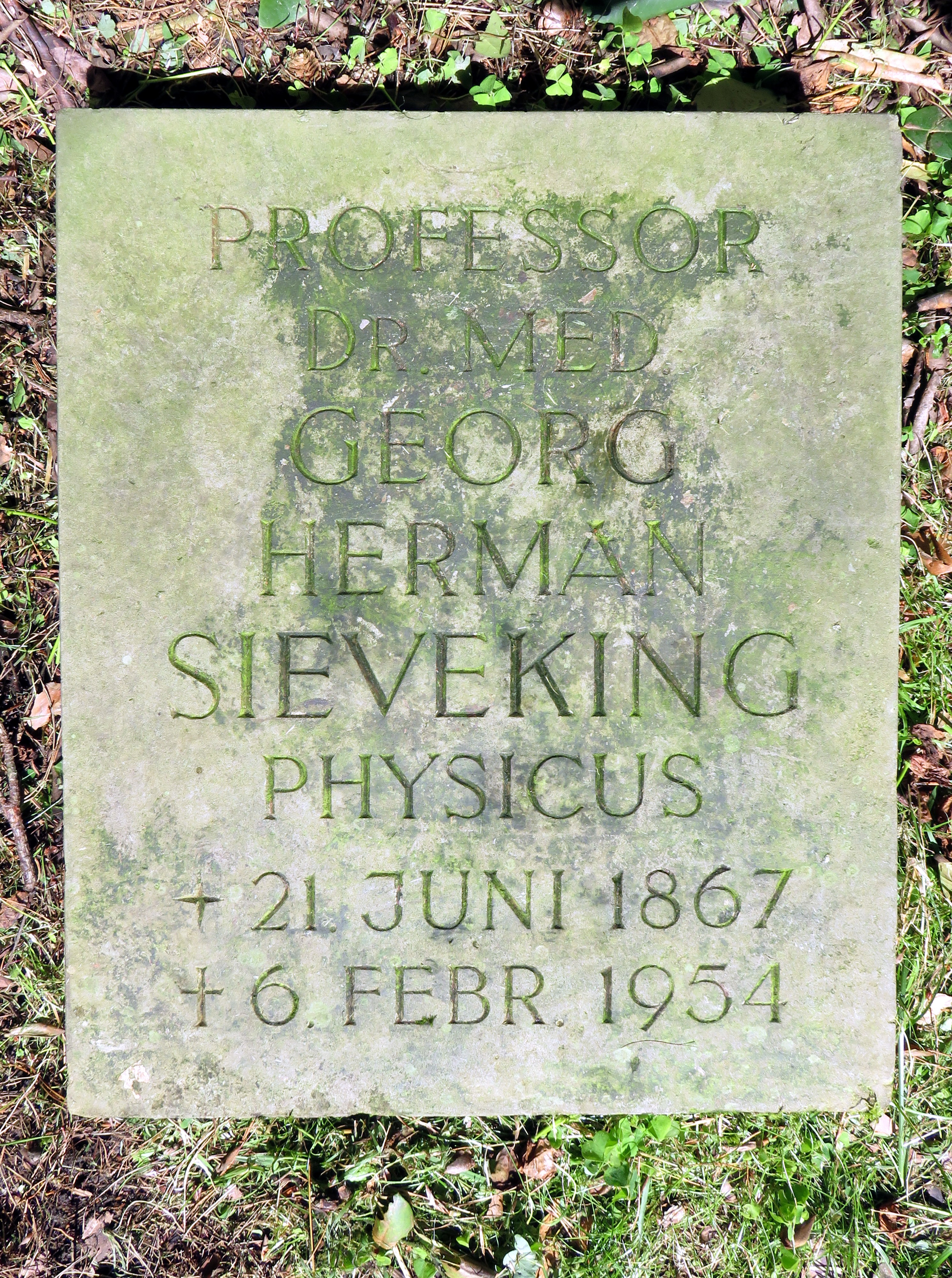 Grabkissen für den Hamburger Arzt und Politiker Georg Herman Sieveking in der Sieveking-Familien-Grabanlage auf dem Hamburger Friedhof Ohlsdorf, Planquadrat S 25 / S 26.